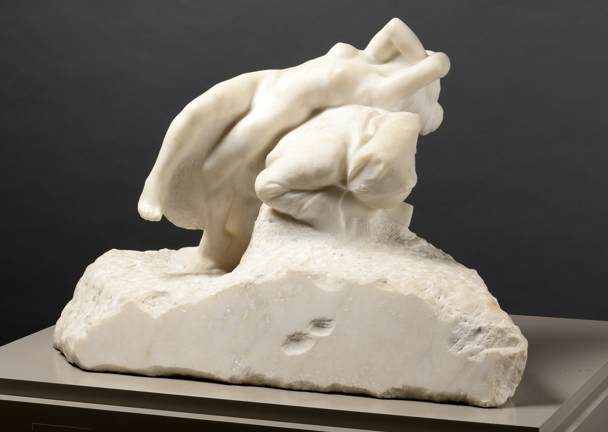 Statue face 1